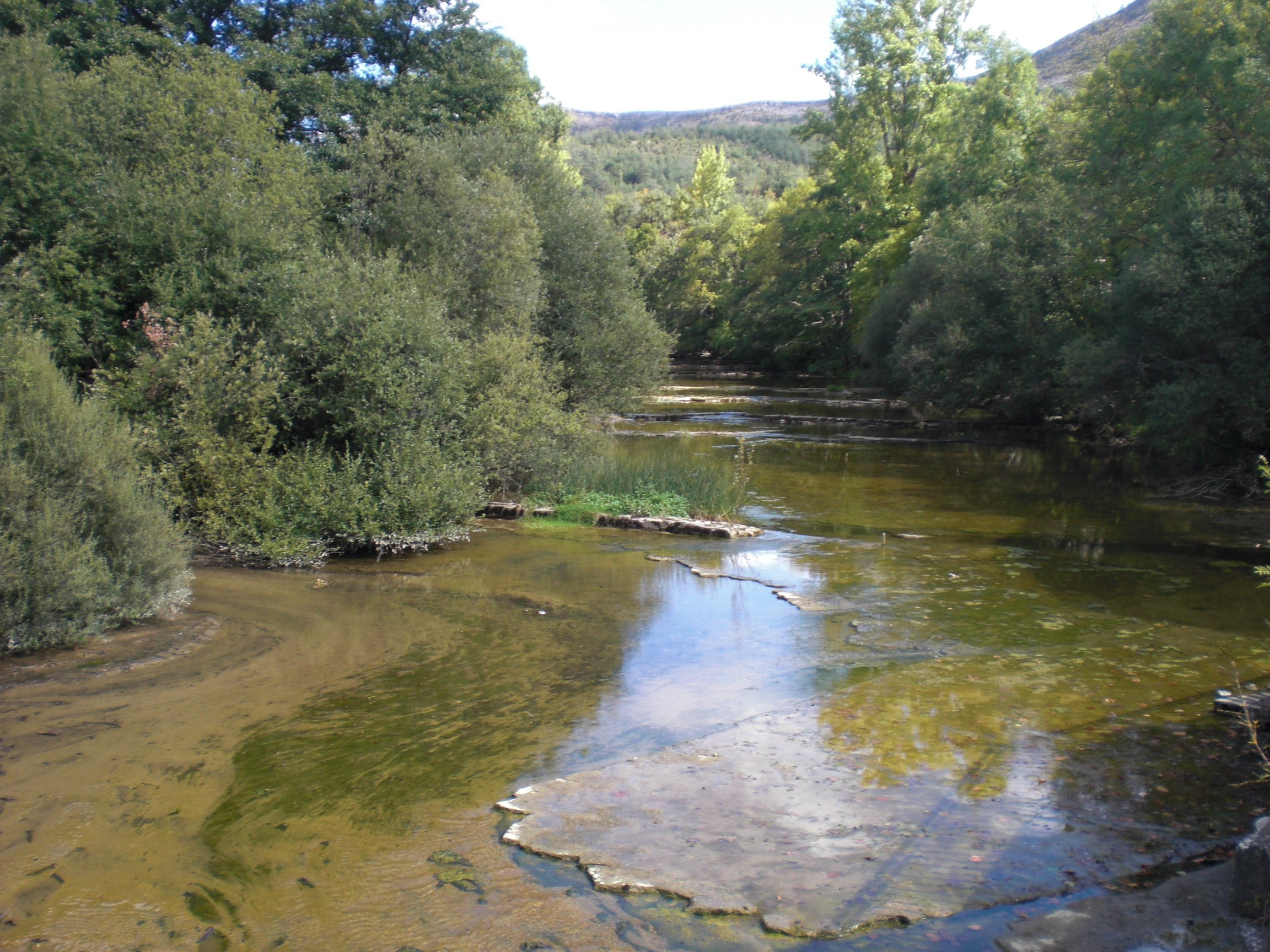 Baias ibaia Zuhatzu Kuartango parean.